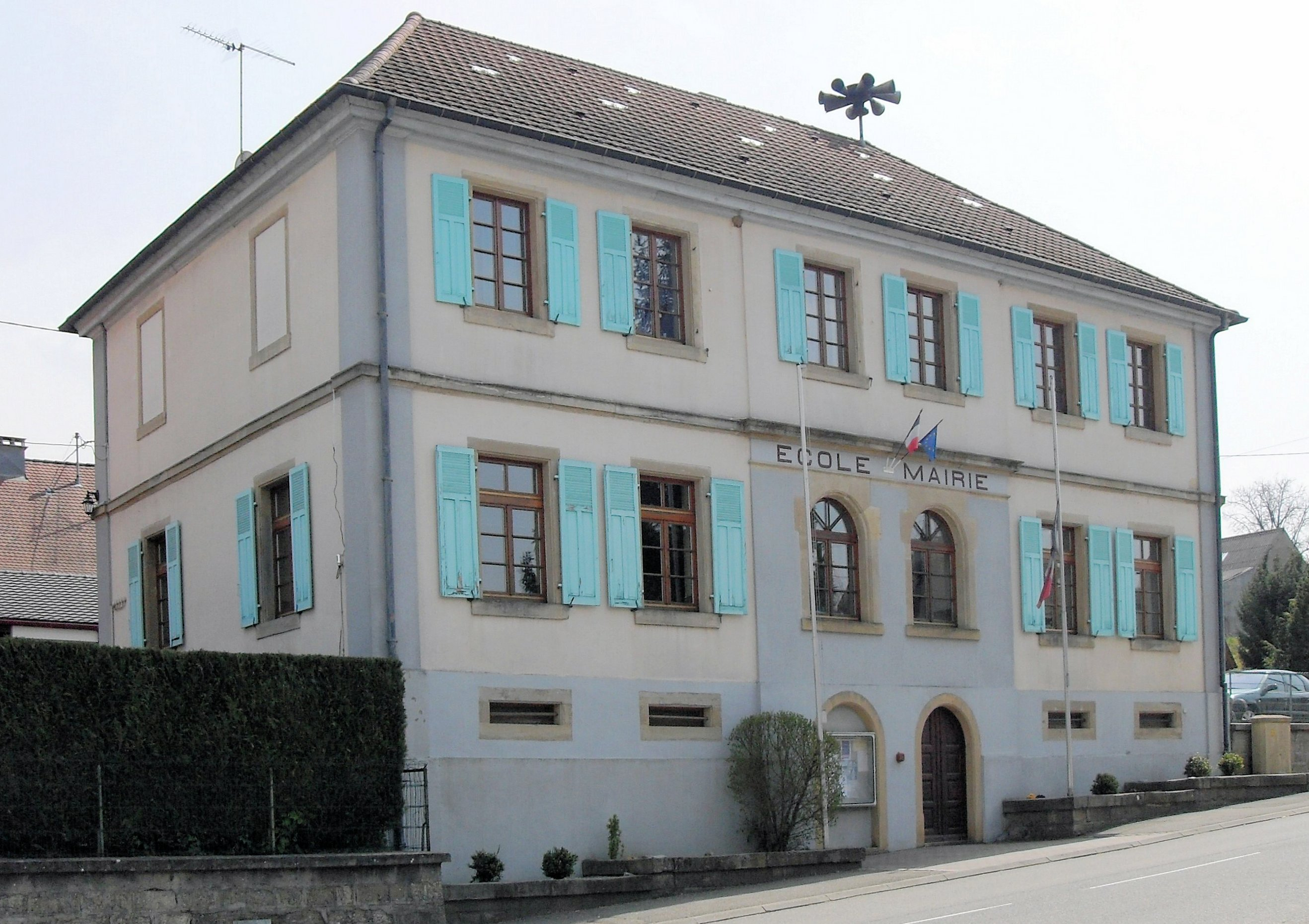 La mairie-école de Willer